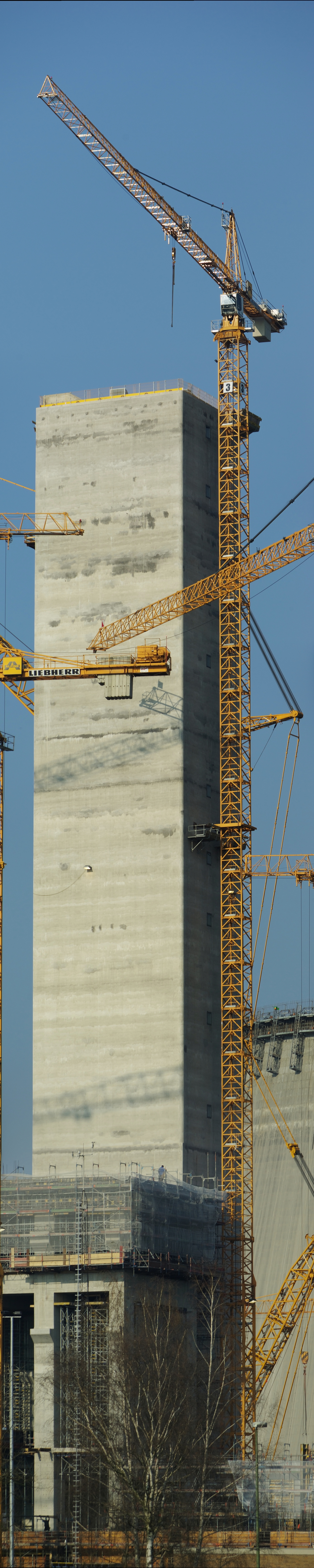 Baukran an der Kraftwerkbaustelle in Hamm-Uentrop